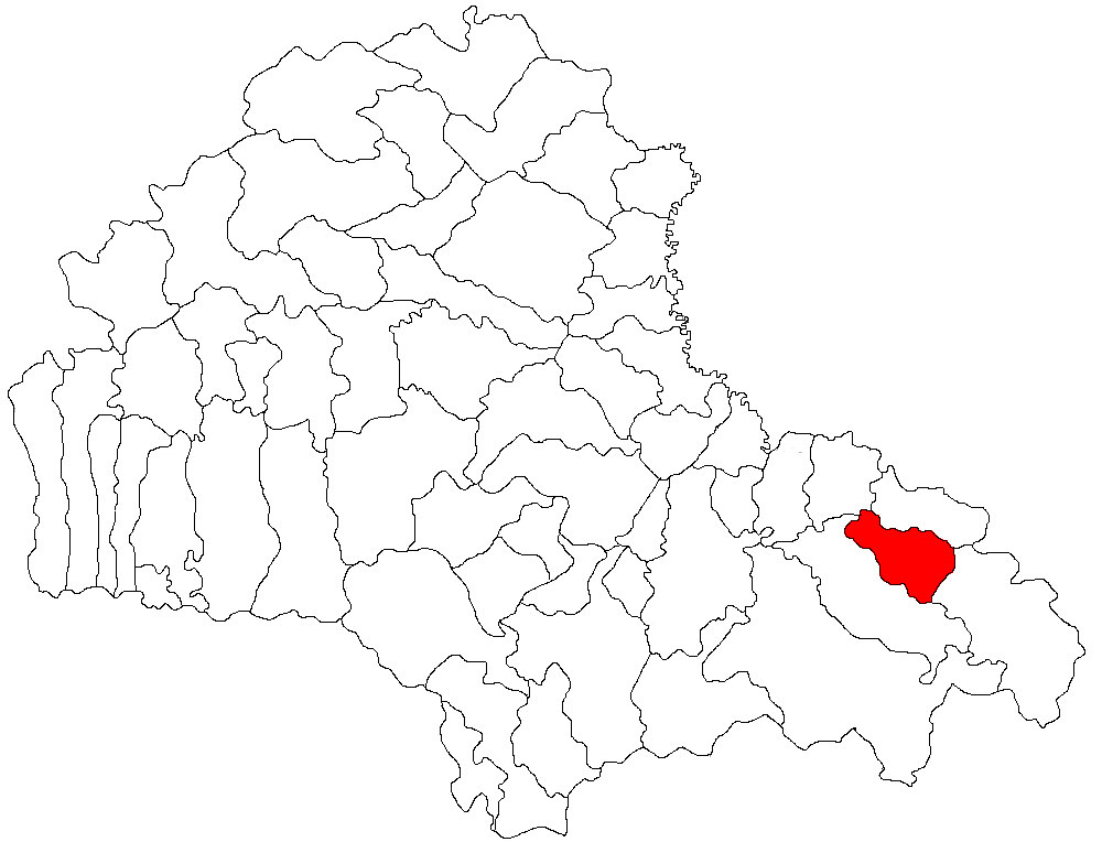 Categorie:Hărţi ale judeţului Braşov